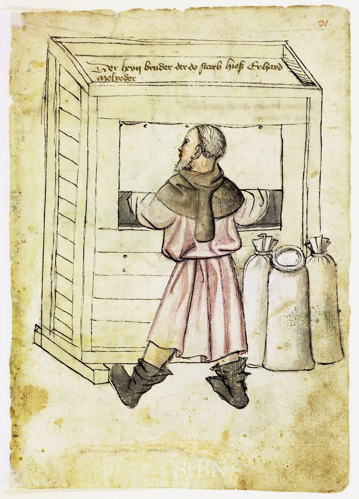 Erhard Melreder , Melreder (Mehlsieber) Transkription und weitere Informationen